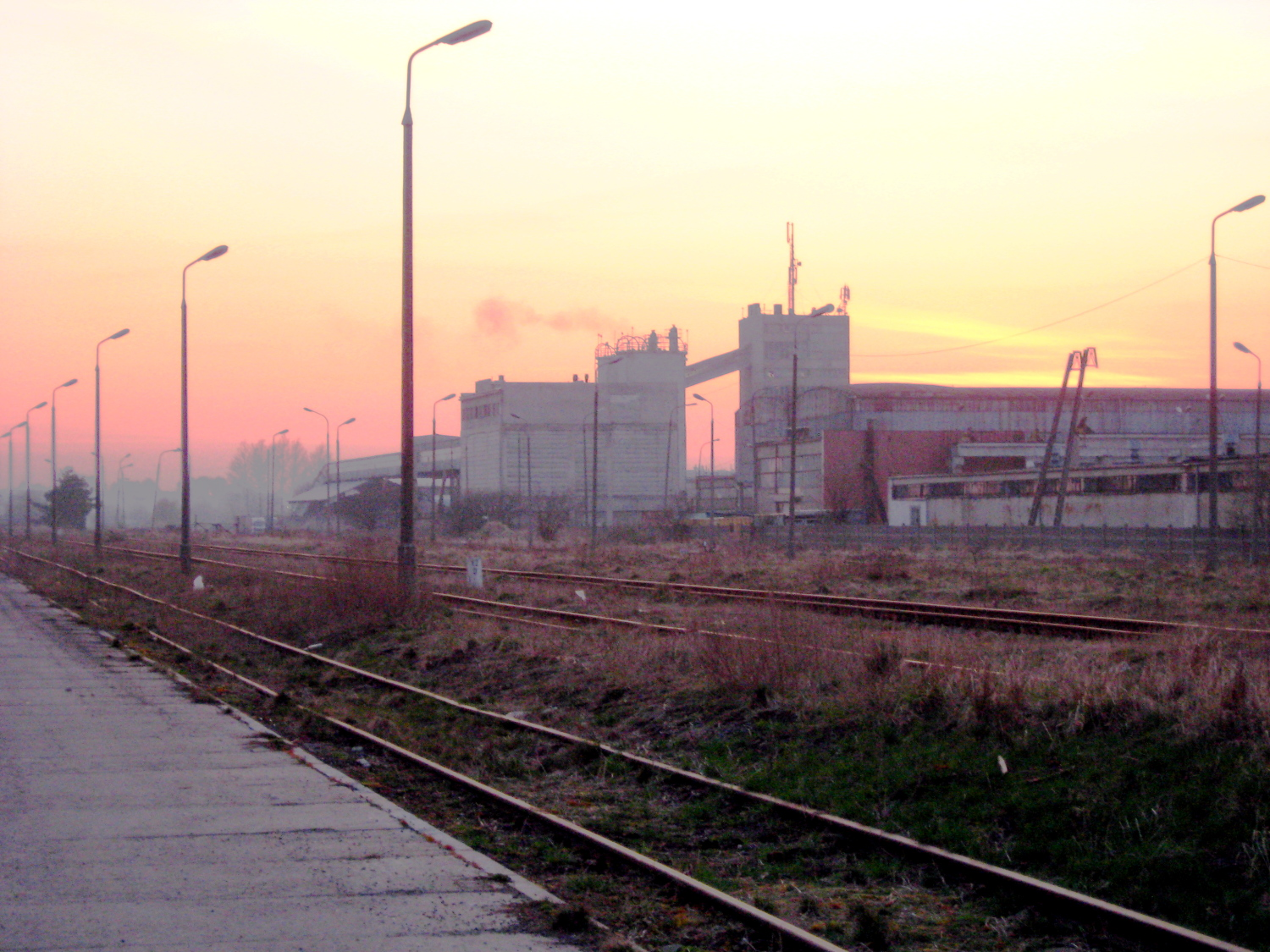 Stacja kolejowa Kokoszki (Gdańsk) i zakłady PB Kokoszki - Wytwórnia Elementów Prefabrykowanych.